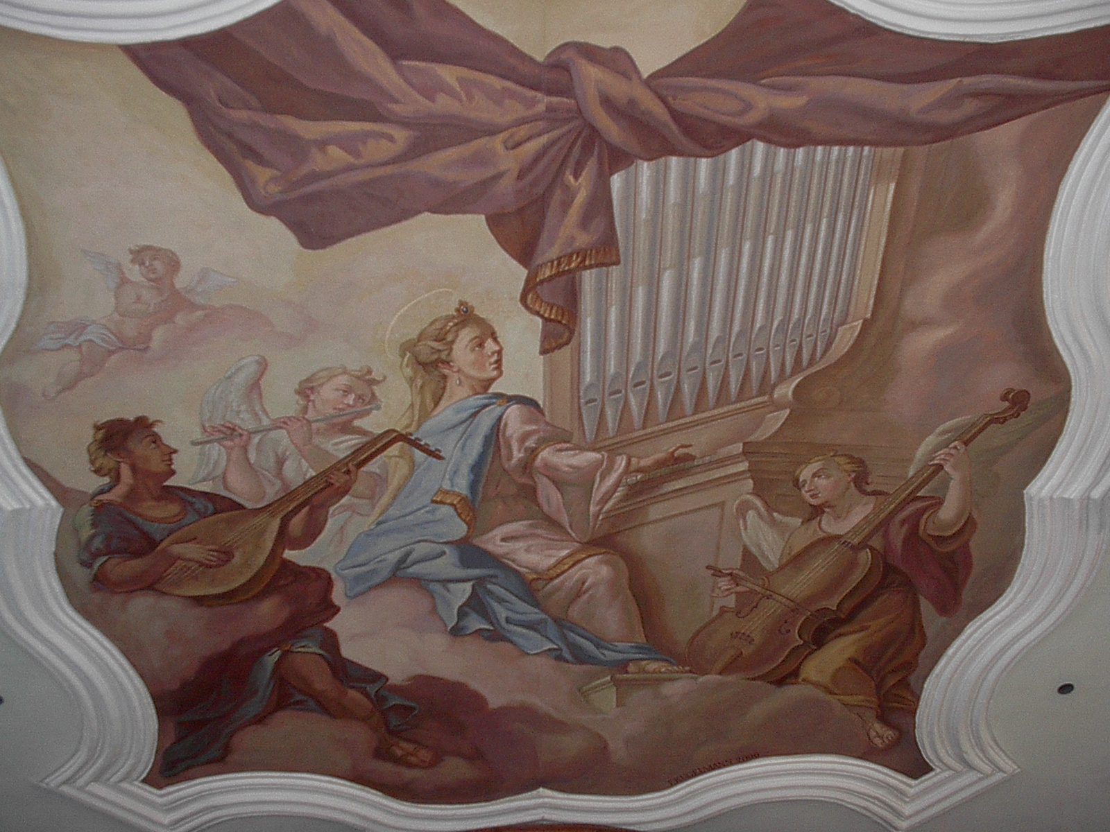 Als Deckengemälde die Hl. Cäcilia mit den musizierenden Engeln